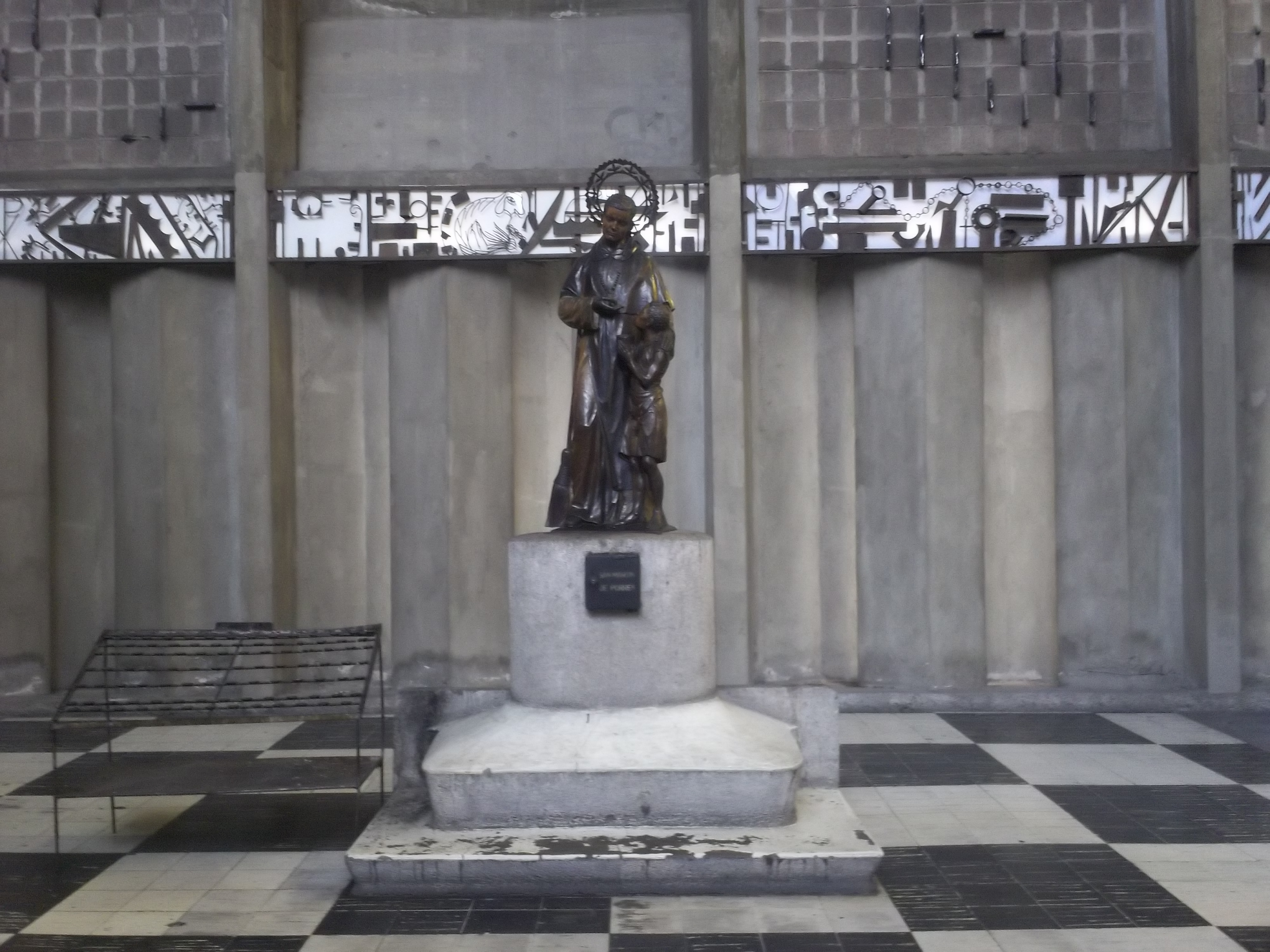 Estatua representativa de otro santo dentro de la iglesia, se puede observar al fondo una linea vertical con simbolos.